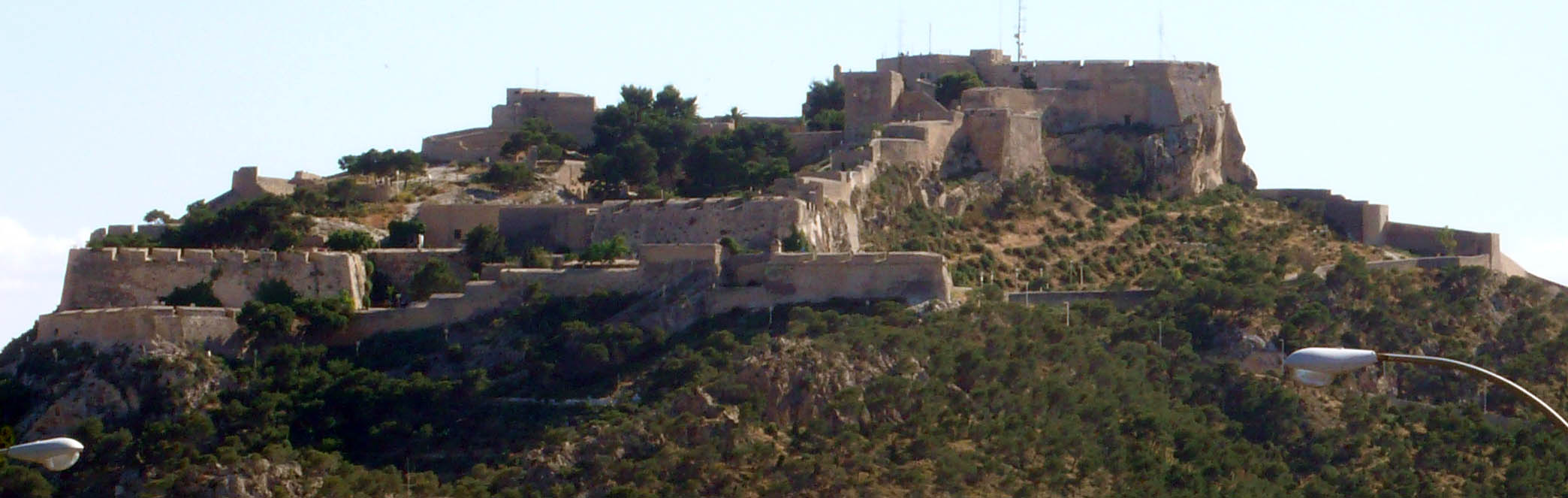 Castell de la Santa Bàrbara (Alacant, l'Alacantí, País Valencià)